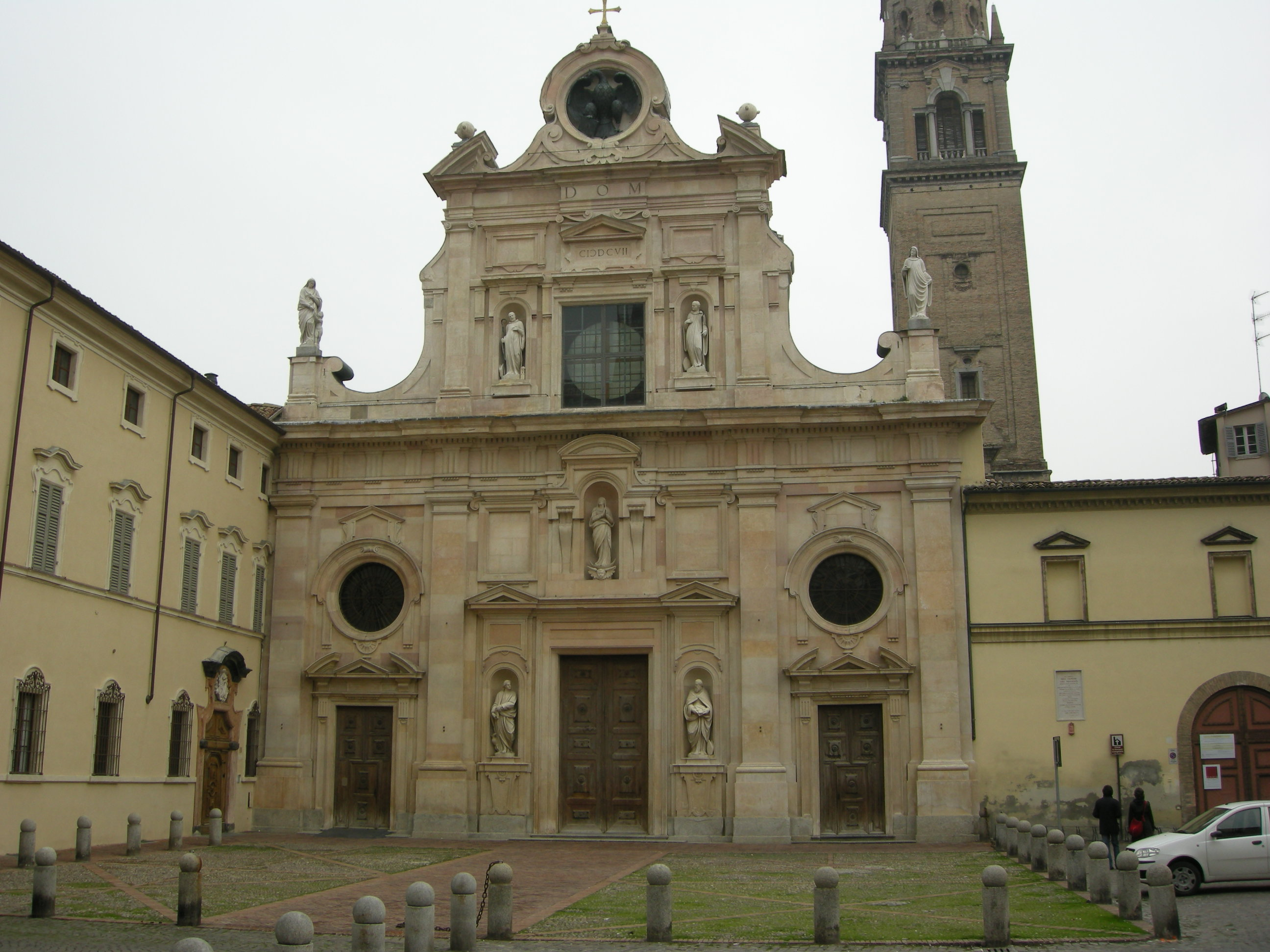 Parma, san giovanni